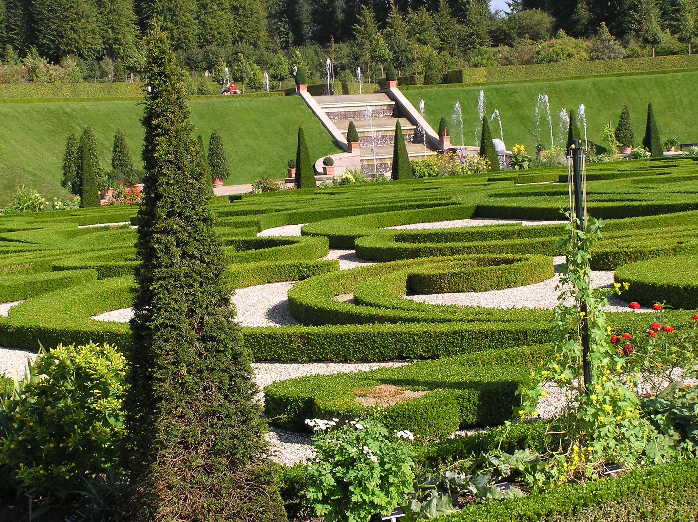 Frederiksborg Slot, Park